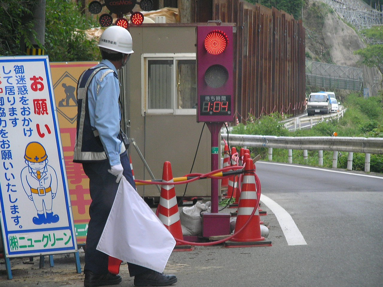 ガードマン